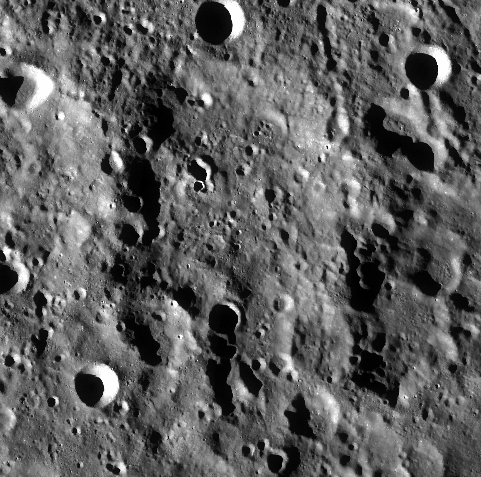 雅勃洛奇科夫环形山照片